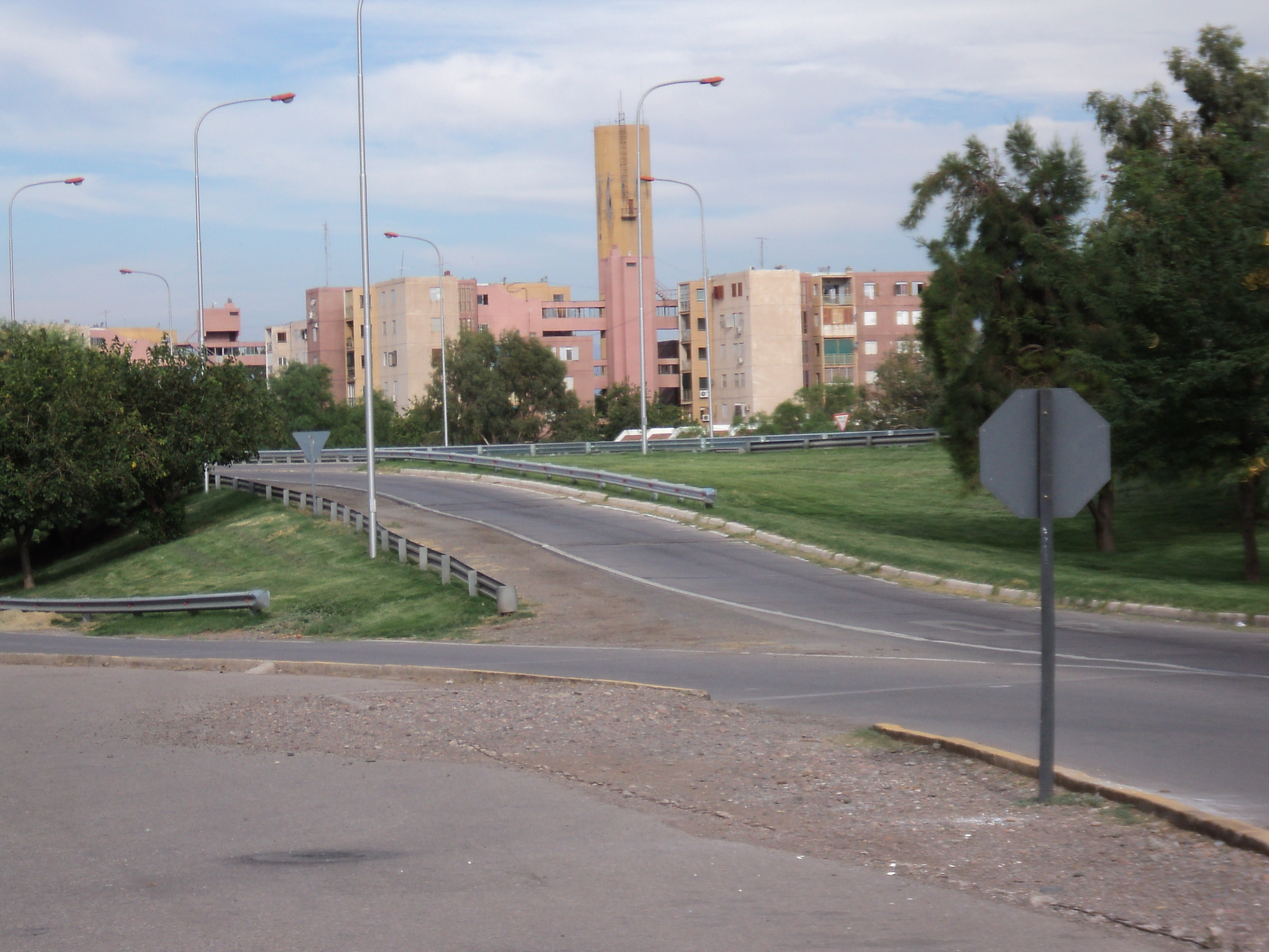 El barrio San Martin con edificaciones de hasta 7 pisos desde la Circunvalación